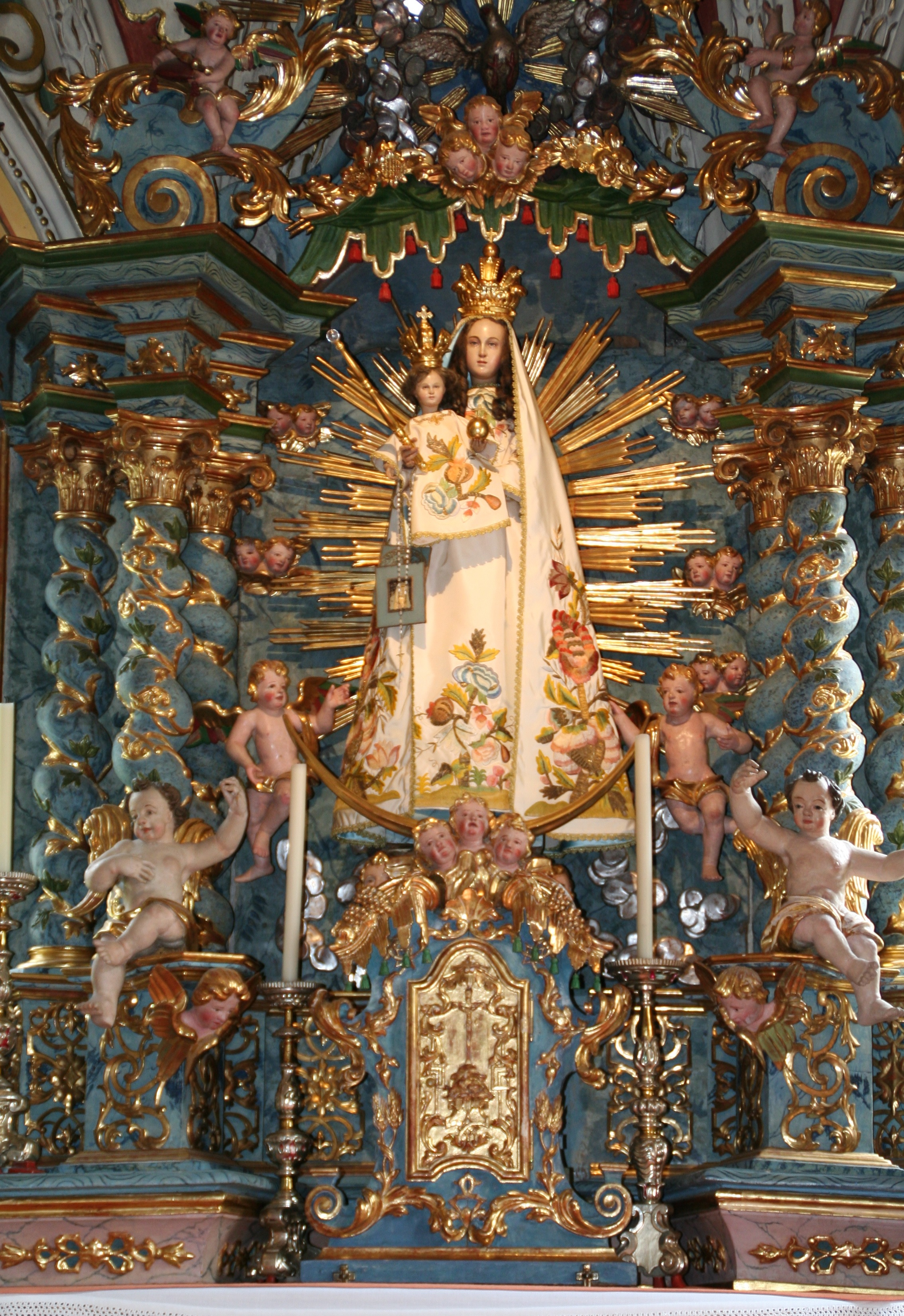 Wallfahrtskirche Maria Licht Madonna im Altar